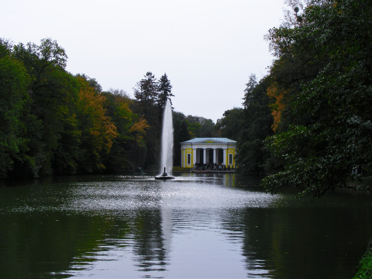 «Софіївка», Уманський район, м. Умань